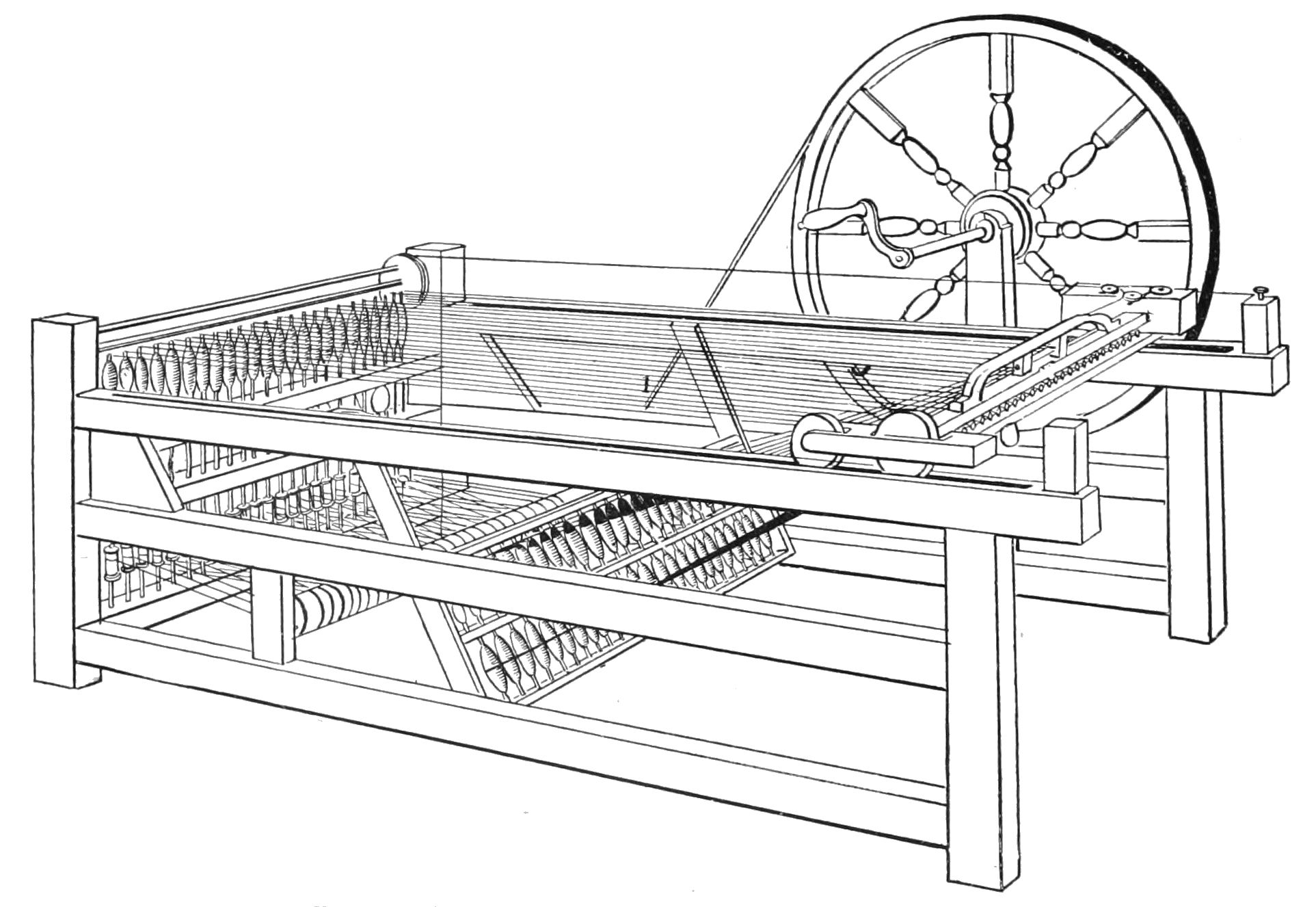 Hargreave improved spinning jenny